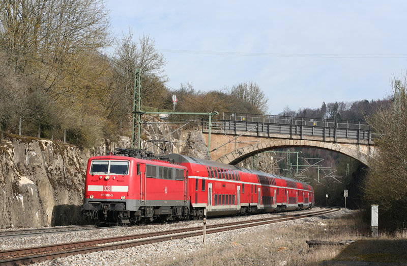 Nahverkehrszug Nürnberg - München mit Br 111 im ehemaligen Bf Möhren